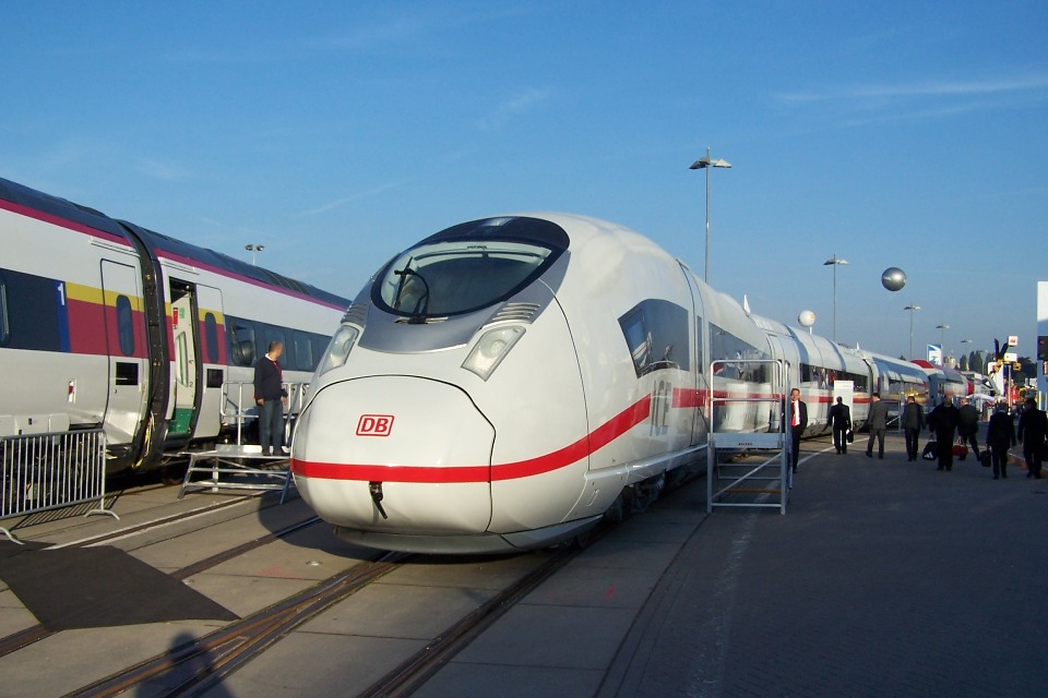 Velaro D auf der InnoTrans 2010 Frontansicht.